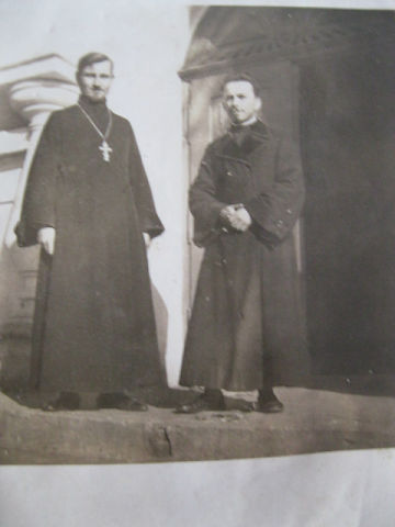 Черничин.Православні священники перед входом до церкви. 30-ті р.ХХст.